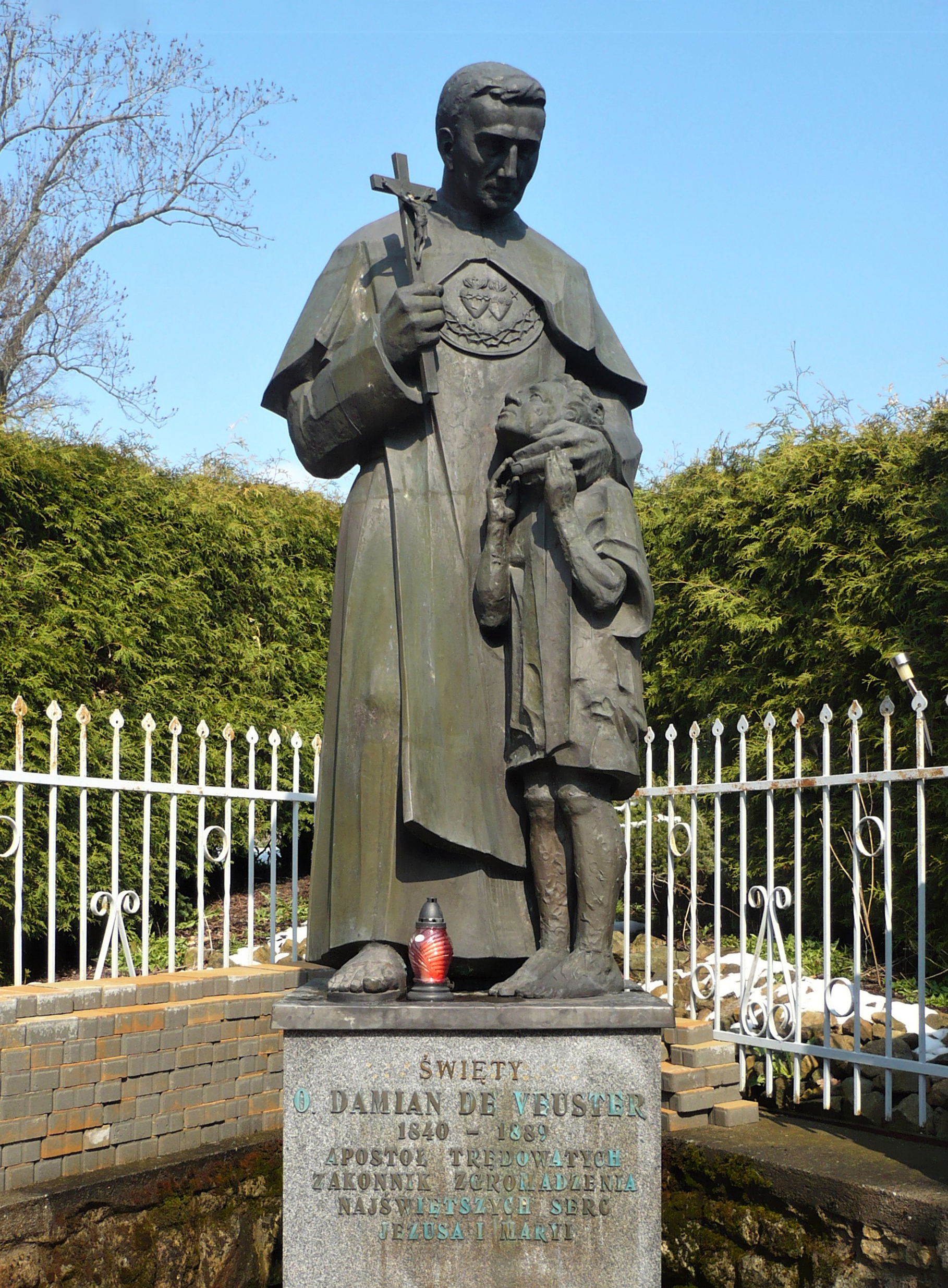 Sokołówka (Polanica-Zdrój). Damian De Veuster